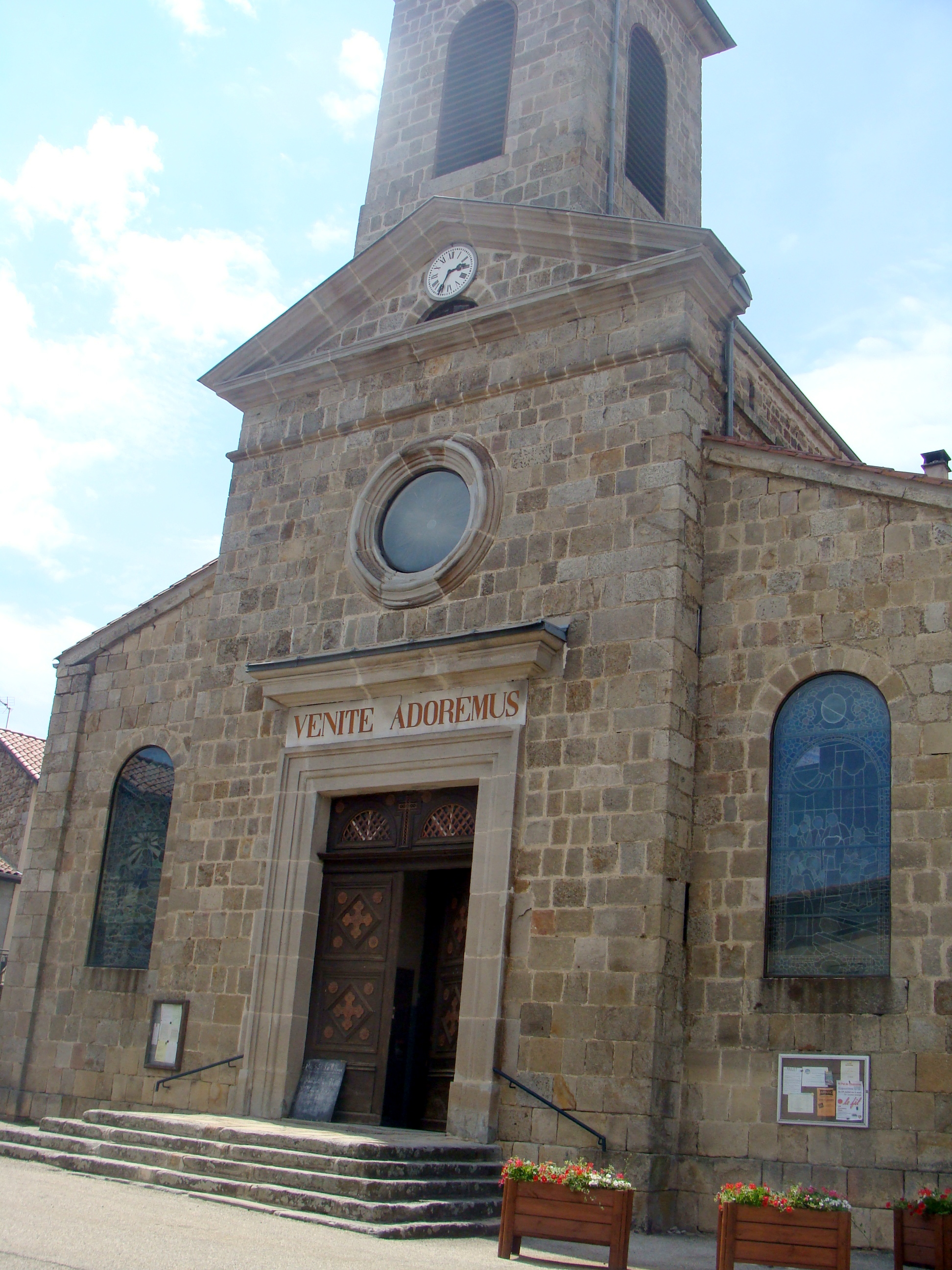 Eglise d'Apinac avec en fronton : VENITE ADOREMUS (du latin, qui signifie Venez, adorons)